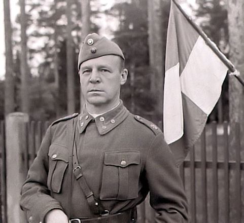 Talvisodan 7. Divisioonan komentaja eversti Einar Vihma.